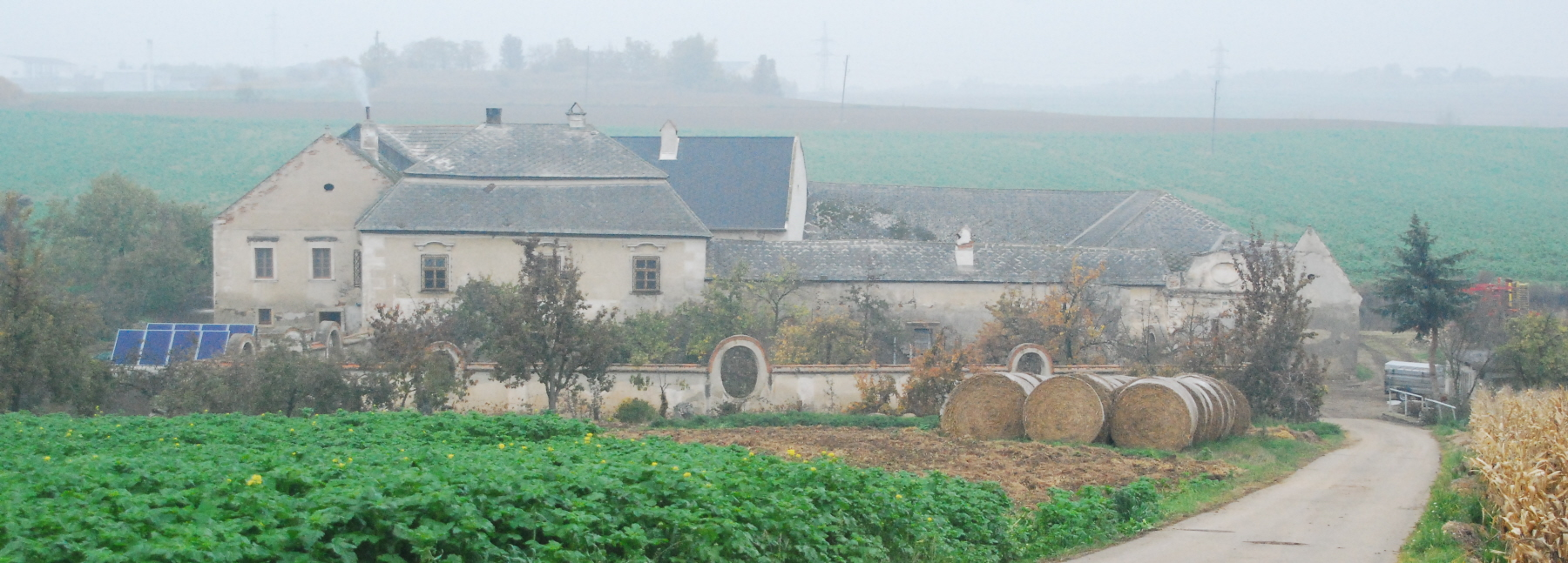 Sog. Vogelsangmühle samt Hof und Gartenhaus u.a.